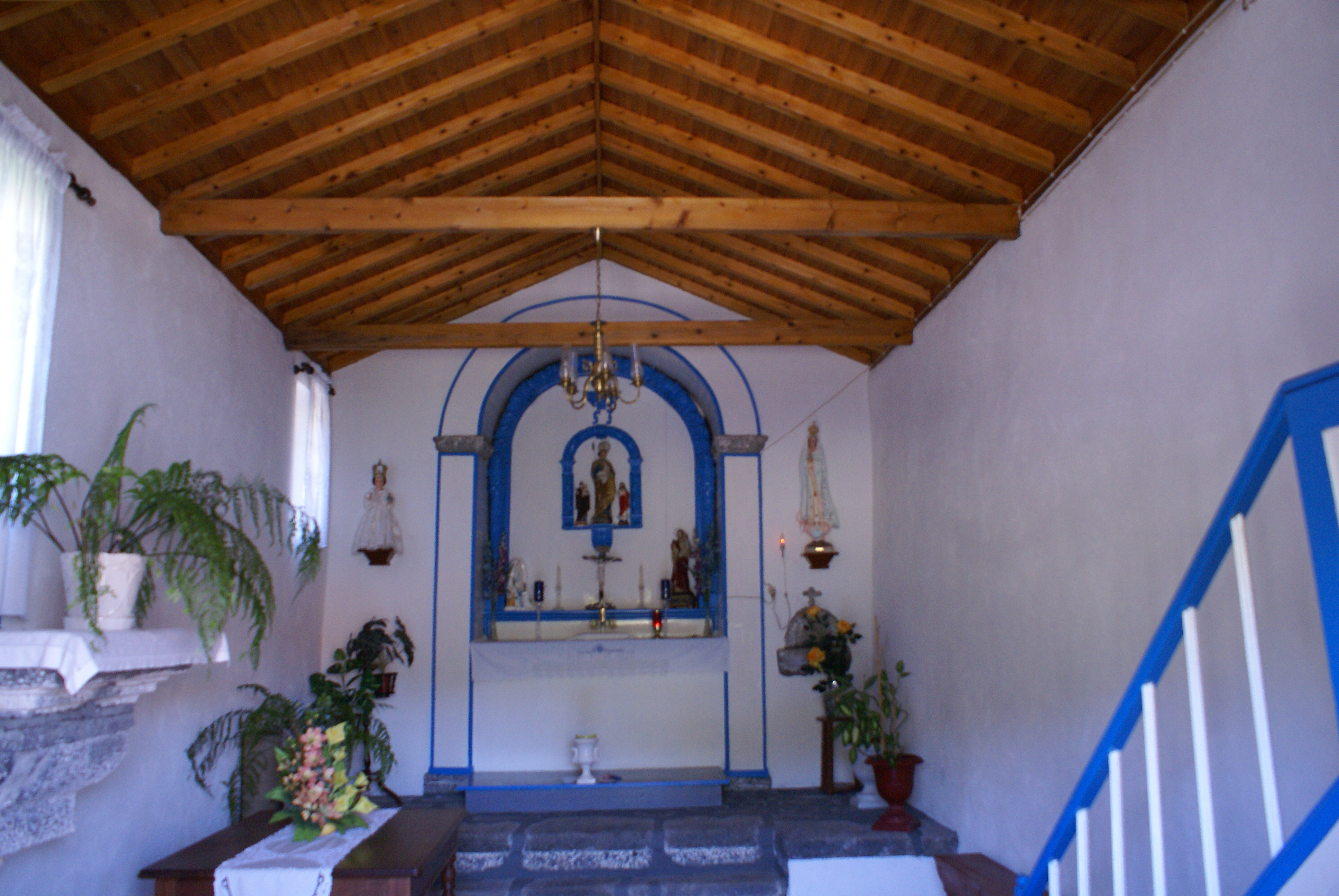 Ermida de São José, Altar, Urzelina, Velas, São Jorge, Açores